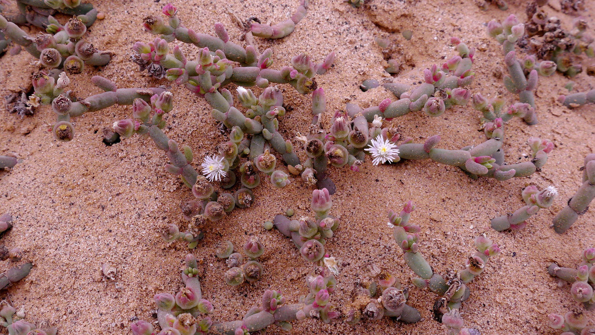 Brownanthus kuntzei in Skeleton Coast (Namibia)